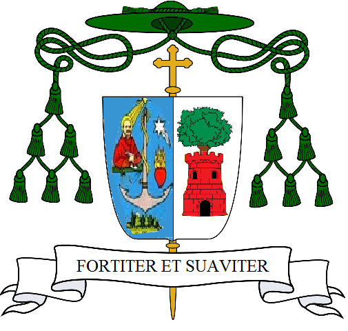 Stemma del vescovo Luigi Maria Olivares